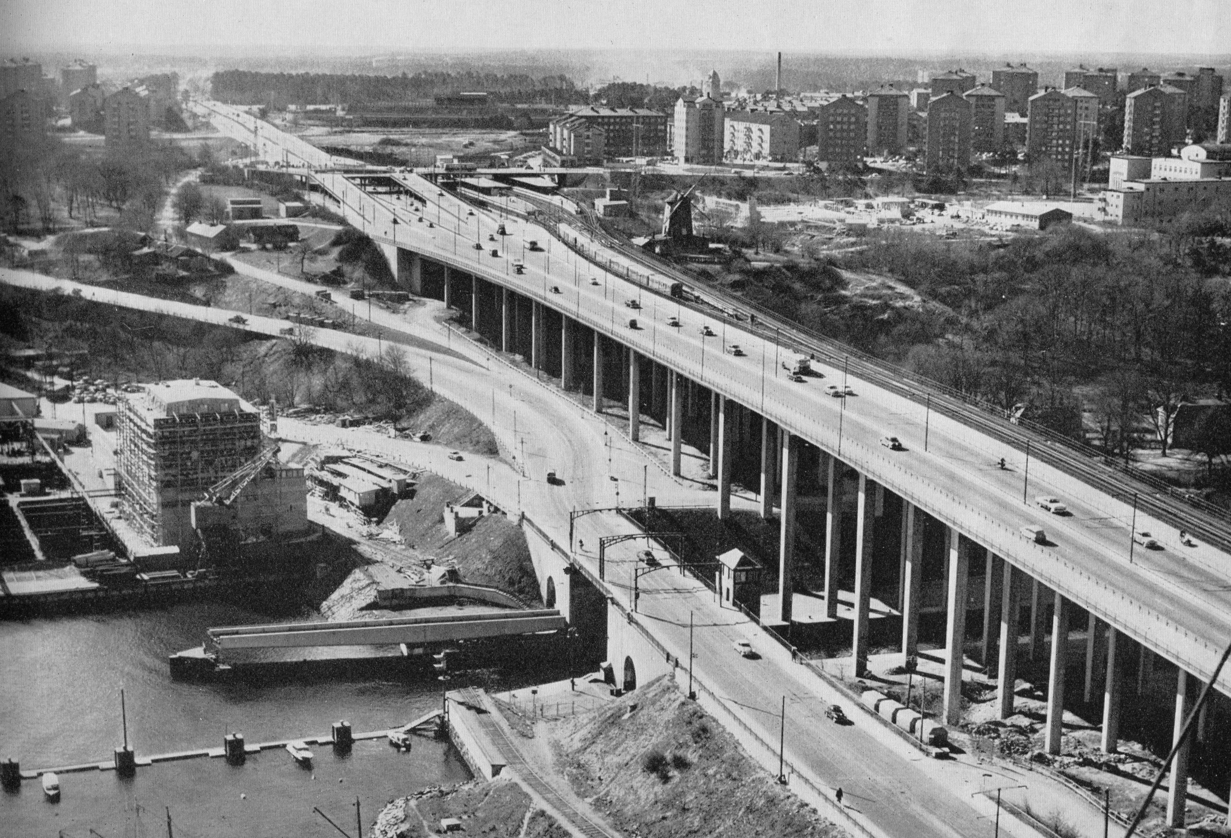 Gamla Skansbron med nya Skanstullsbron, vy mot syd